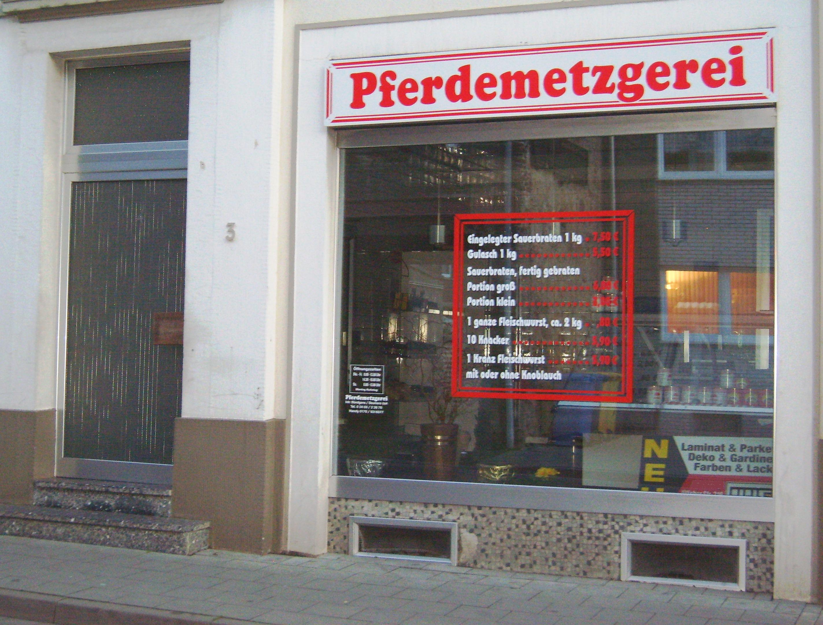 Pferdemetzgerei im rheinischen Eschweiler